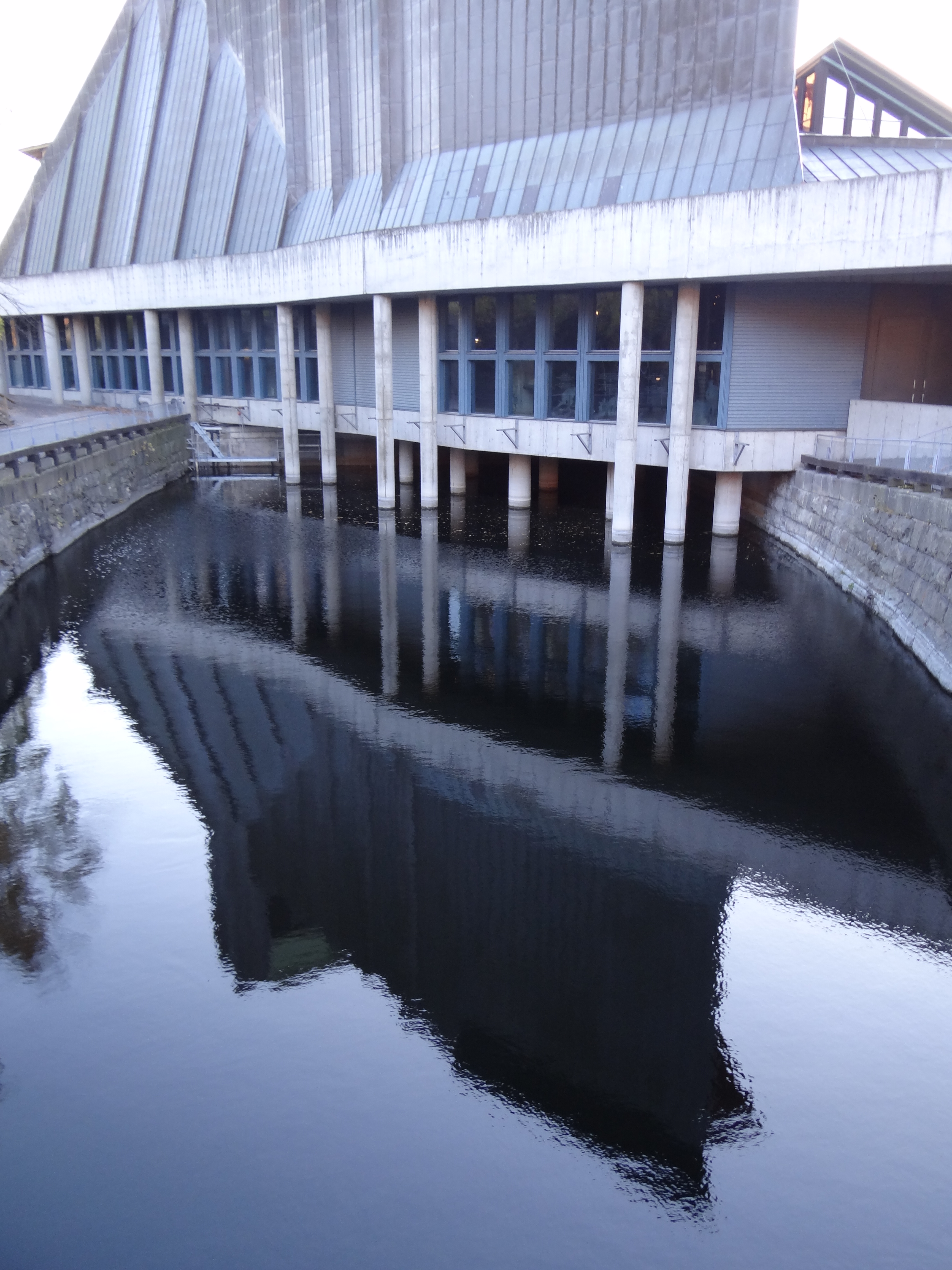 מוזיאון ואסה הוא מוזיאון ימי בסטוקהולם שבשוודיה. הוא מציג את "ואסה", אוניית מפרשים מלחמתית מן המאה ה-17. האונייה טבעה בהפלגת הבכורה שלה ב-1628, ונמשתה מקרקעית הים ב-1961 כשהיא שלמה כמעט לחלוטין בצילום מבנה המוזיאון מבט מצידו המופנה אל האי עם השתקפות במי הבריכה בחזית המוזיאון